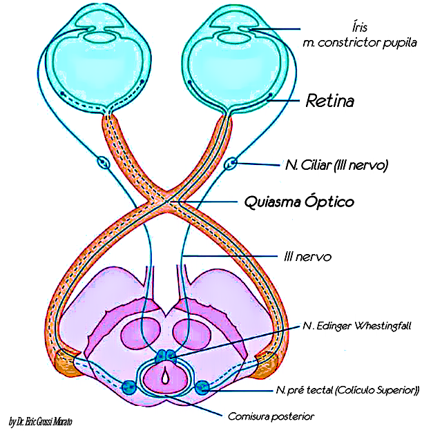 Vias do reflexo pupilar e consensual. Mostra todas as estruturas neuroanatômicas importantes nas vias aferente e eferente dos reflexos pupilar e consensual